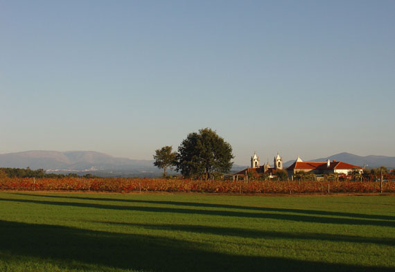 Planalto da Igreja Matriz de S. João de Areias; ao fundo vê-se a Serra da Estrela - Fotografia de António Neves